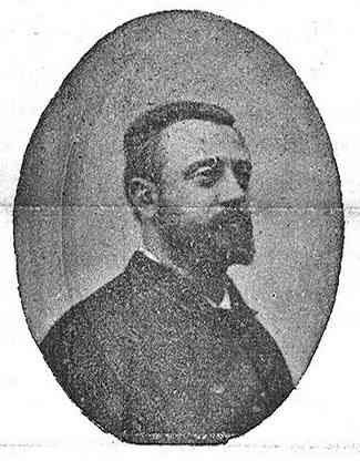 Político tradicionalista